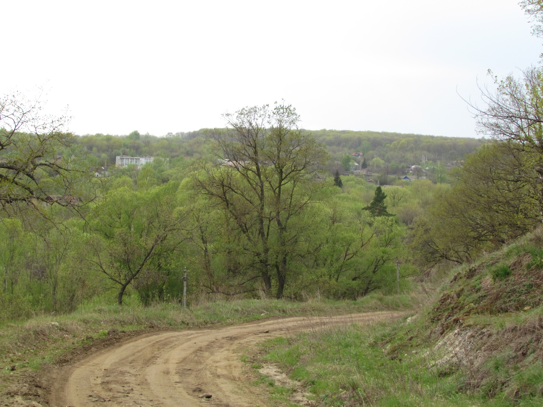 Zubrilovo (Tamala) entrance